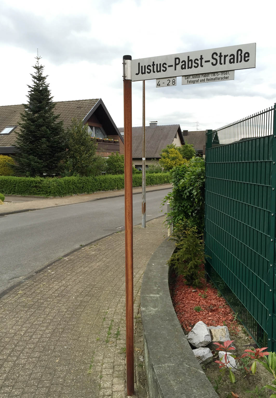 Dieses Foto zeigt das Straßenschild der Justus Pabst Straße